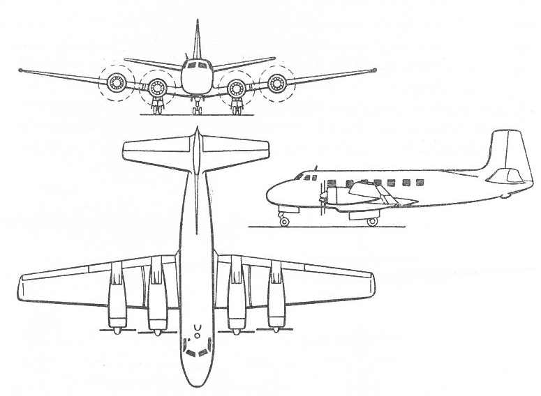 Rzuty samolotu pasażerskiego MD-12P